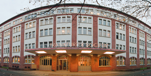 Verlagshaus der Frankfurter Societät in der Frankenalle